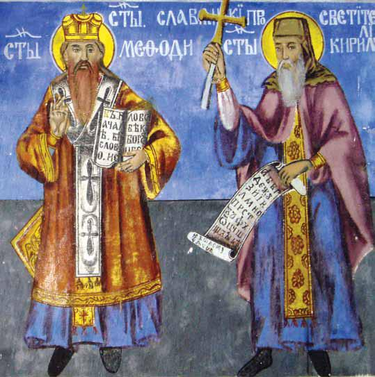 Света, црква Св. Пантелејмон, св. Кирил и св. Методија, северен ѕид